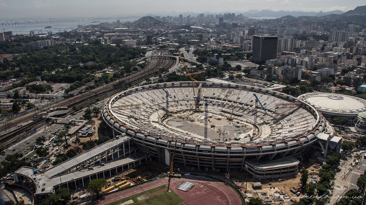 Santo Cristo, Rio de Janeiro - State of Rio de Janeiro, Brazil